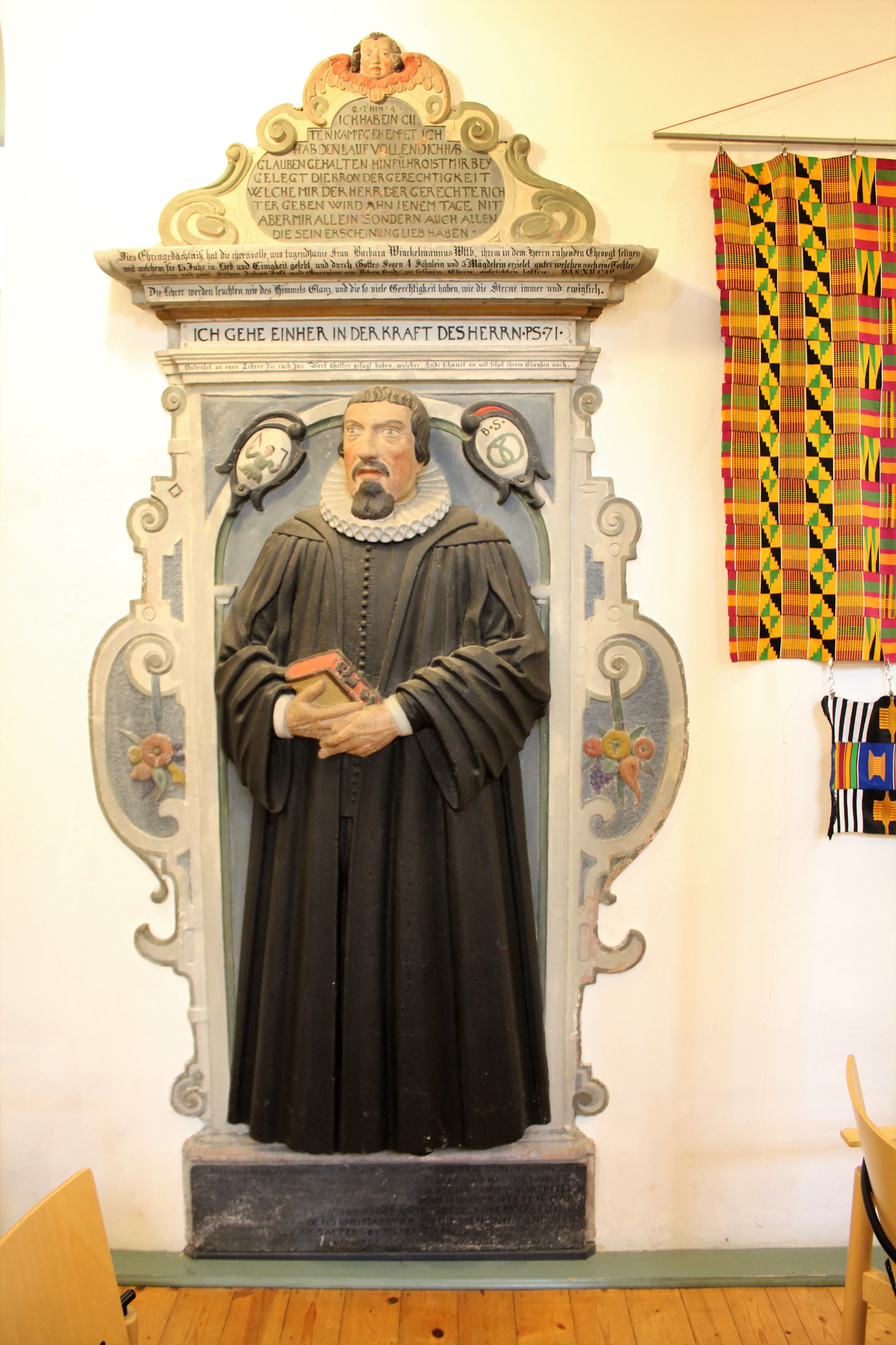 Epitaph für Johannes Winckelmann in der Kapelle Alter Friedhof, Gießen, Hessen, Deutschland